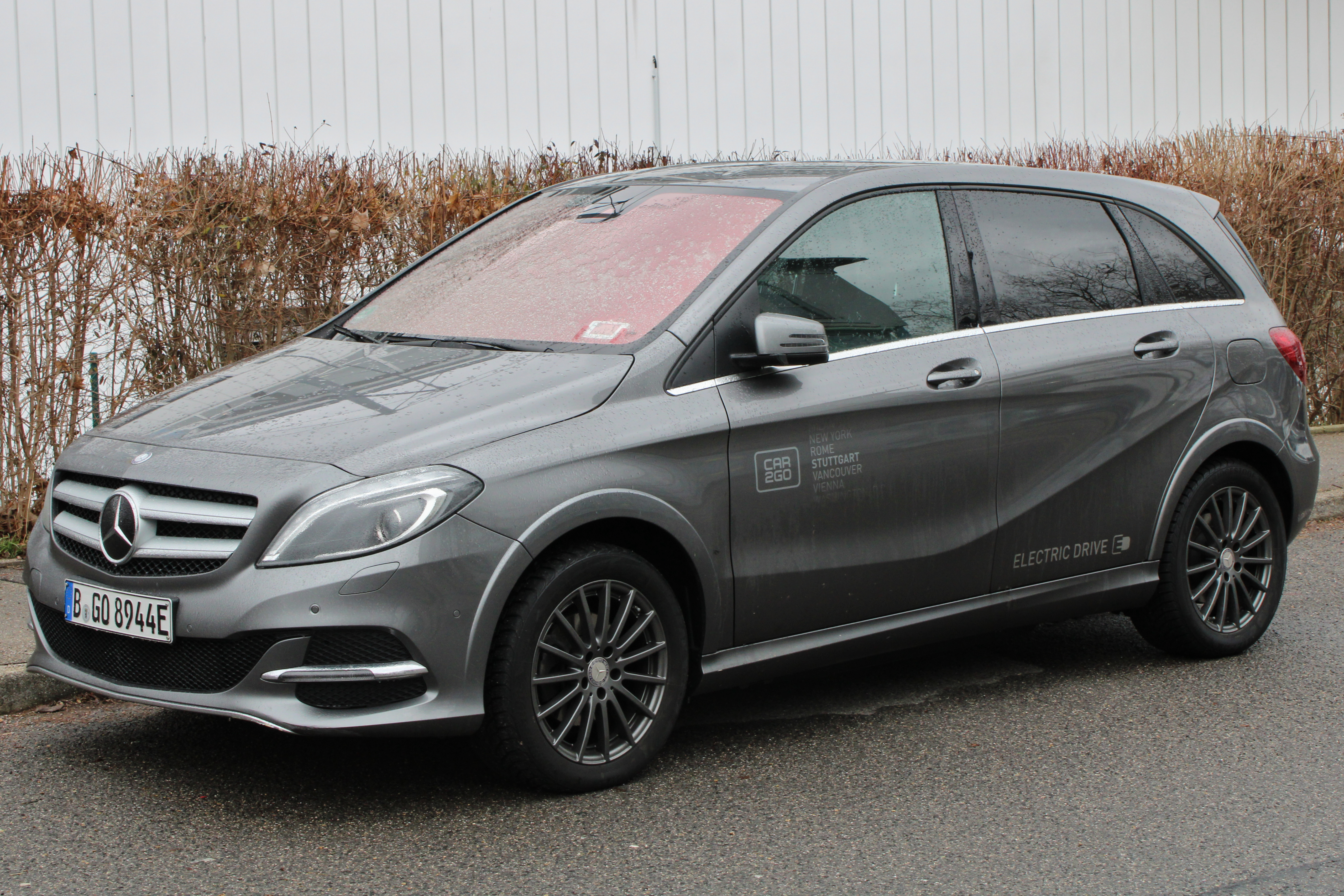 Car2go Mercedes-Benz B 250e in Stuttgart-Vaihingen